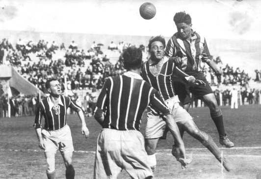 Guzmán en plena acción